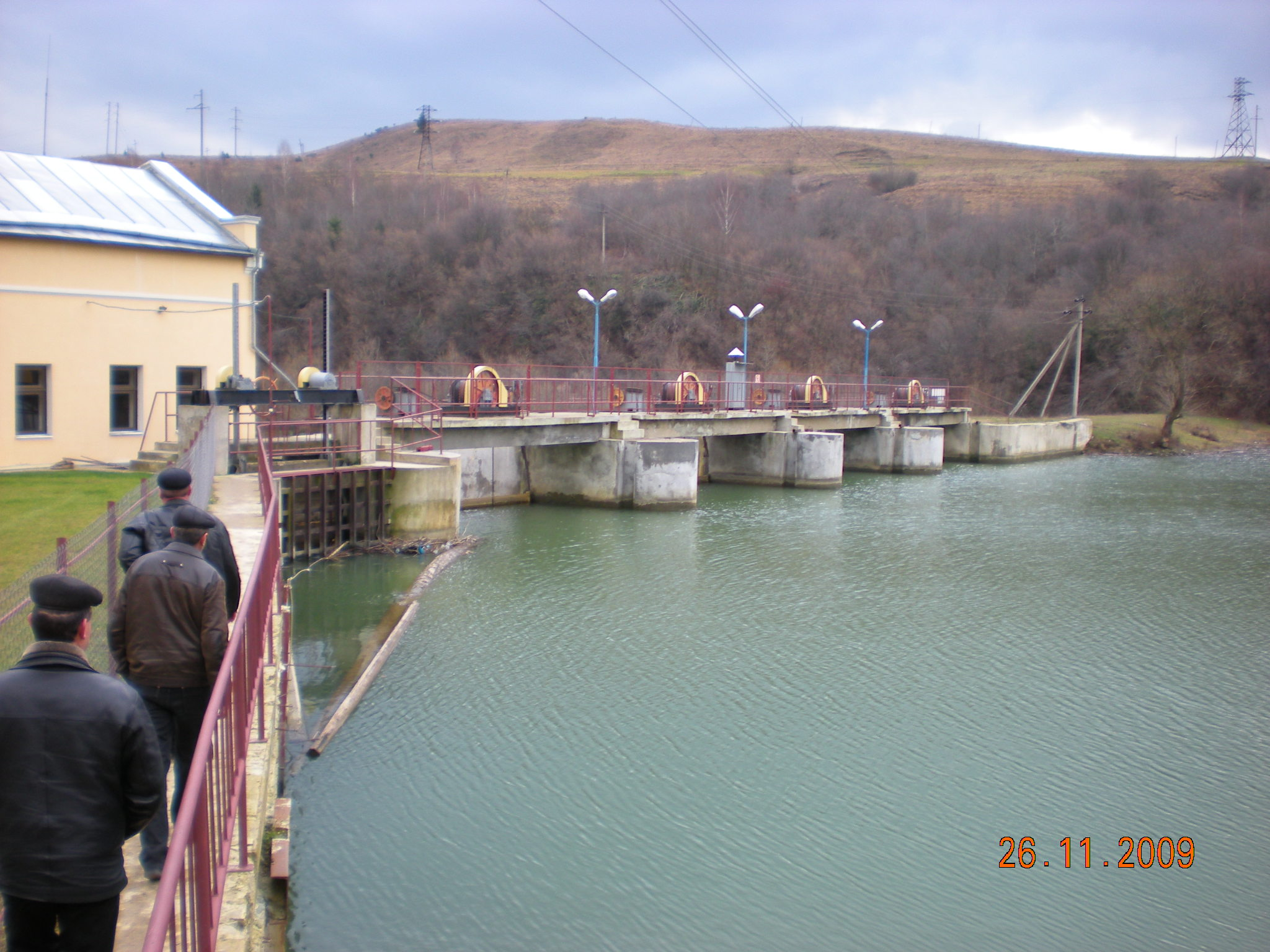 с.Явора- мала ГЕС